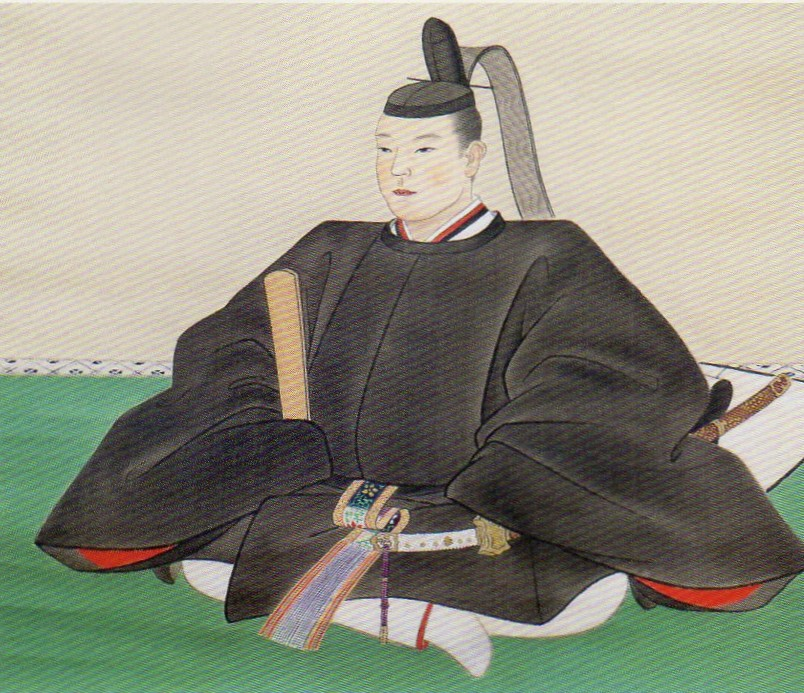 小笠原忠嘉の肖像(モノクロ)。